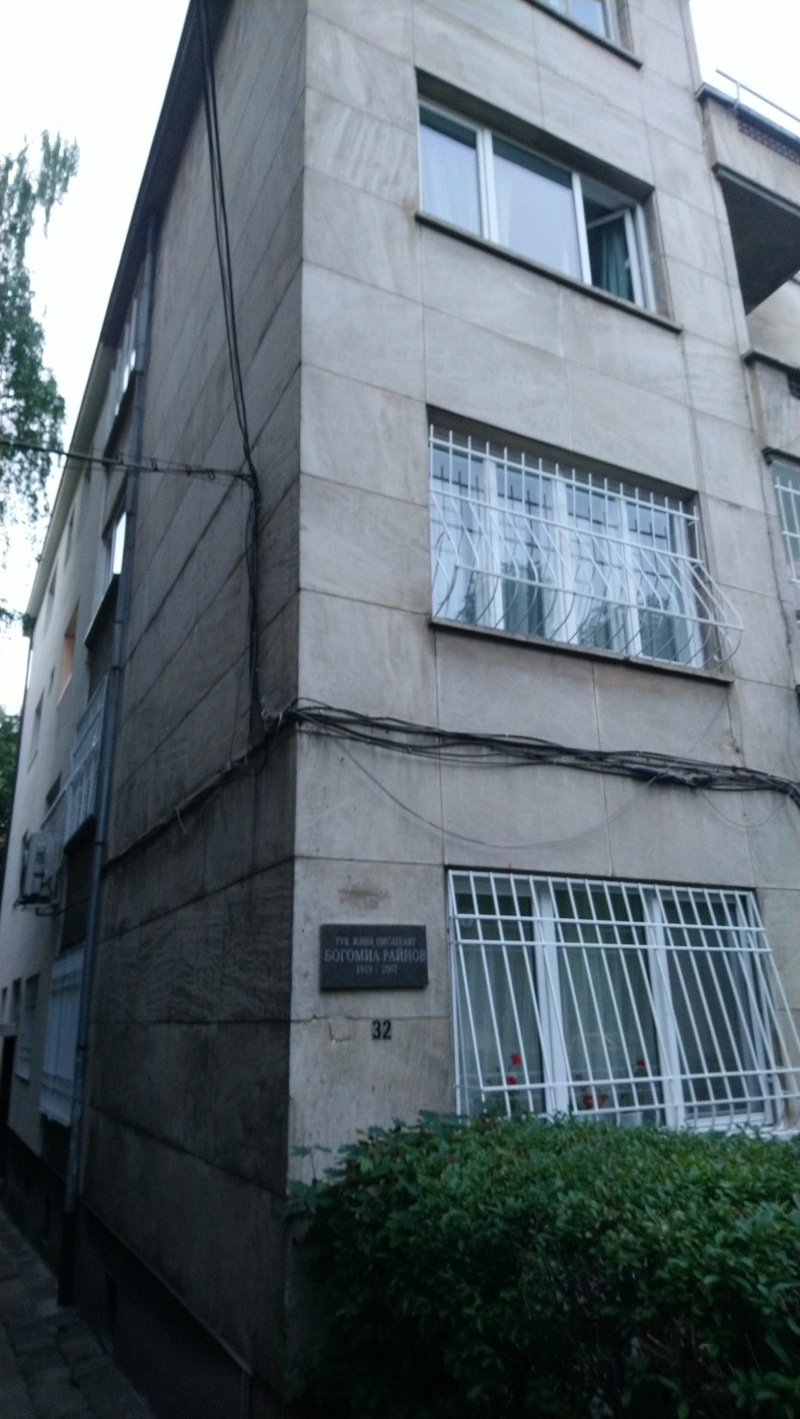 Домът на писателя Богомил Райнов, ул. Елин Пелин 32, София